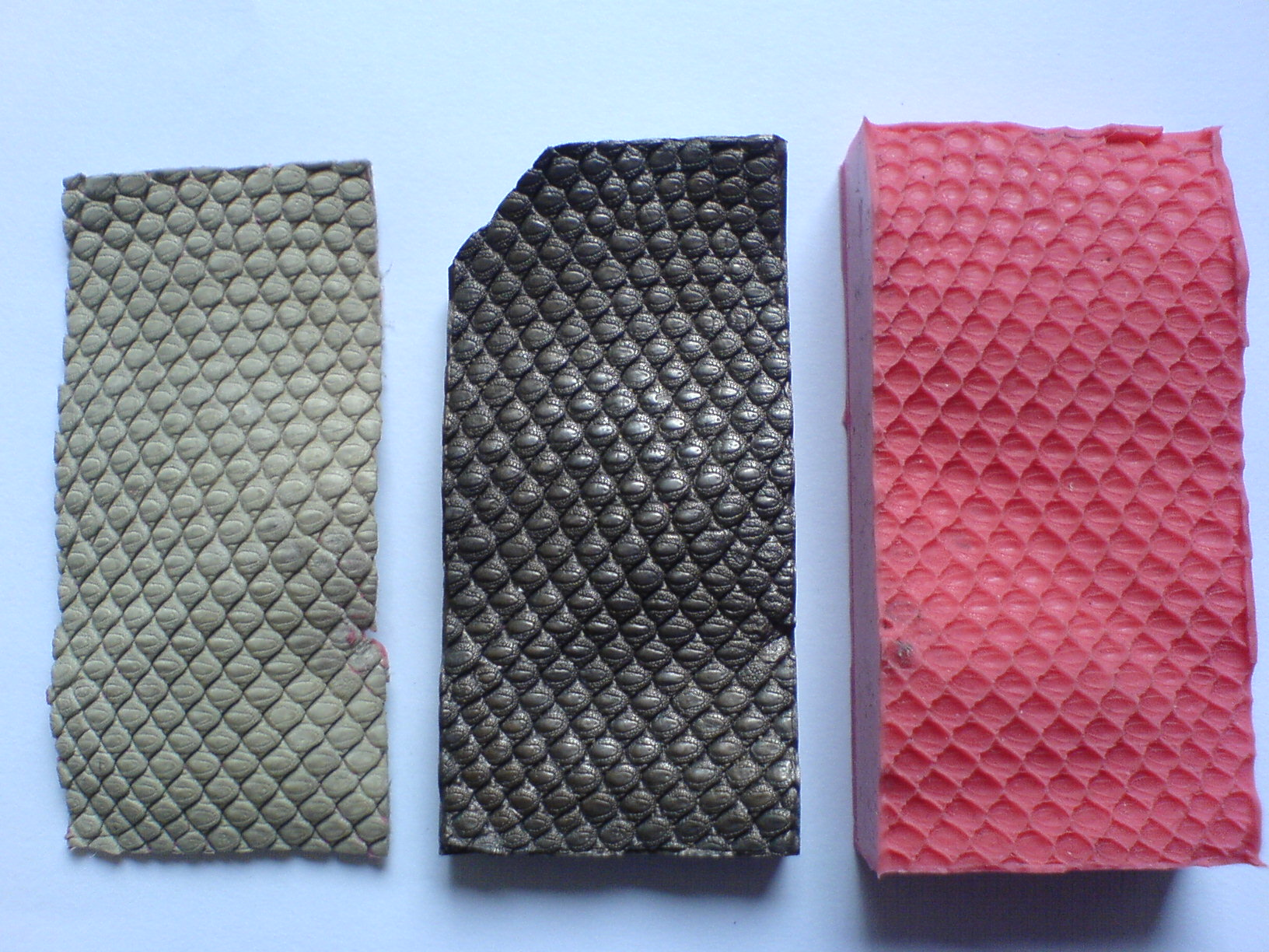 Leguanleder Original / Metalleinsatz / Silikonabdruck Zeichner/Fotograf: Harald Sonstiges: Das Bild wurde von mir selbst aufgenommen. Es stellt ein Metallteil dar, das Eigentum der AWBTopTooling GmbH & Co.KG ( ist. Die Genehmigung zur Fotografie und Veröffentlichung wurde von der Geschäftsleitung erteilt. Das Bild darf (Quellenangabe erwünscht) in jeder Form und Art weiterverwendet werden.